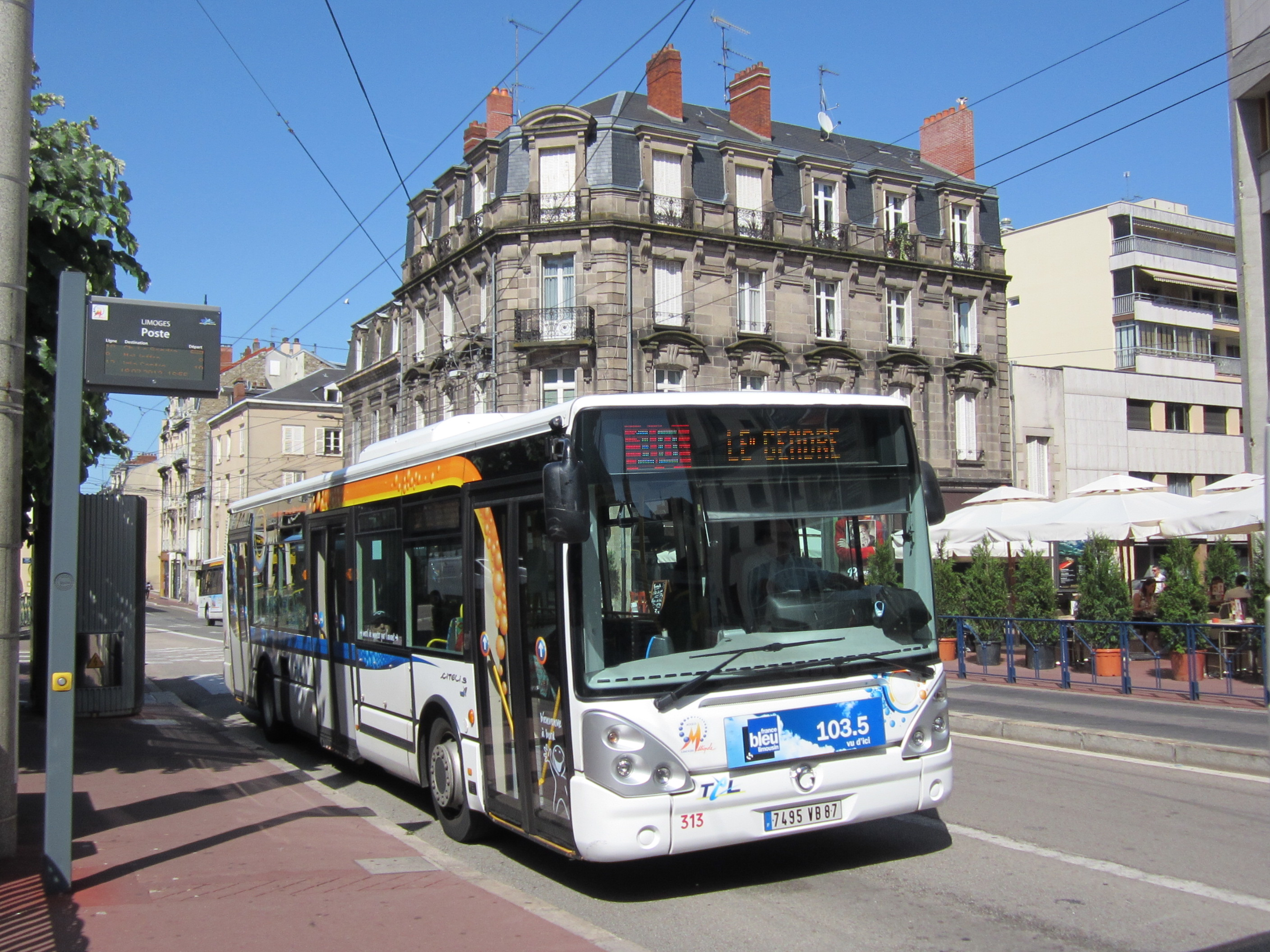 Irisbus Citelis 12 n°313 sur la ligne 10 TCL de Limoges, à l'arrêt Poste